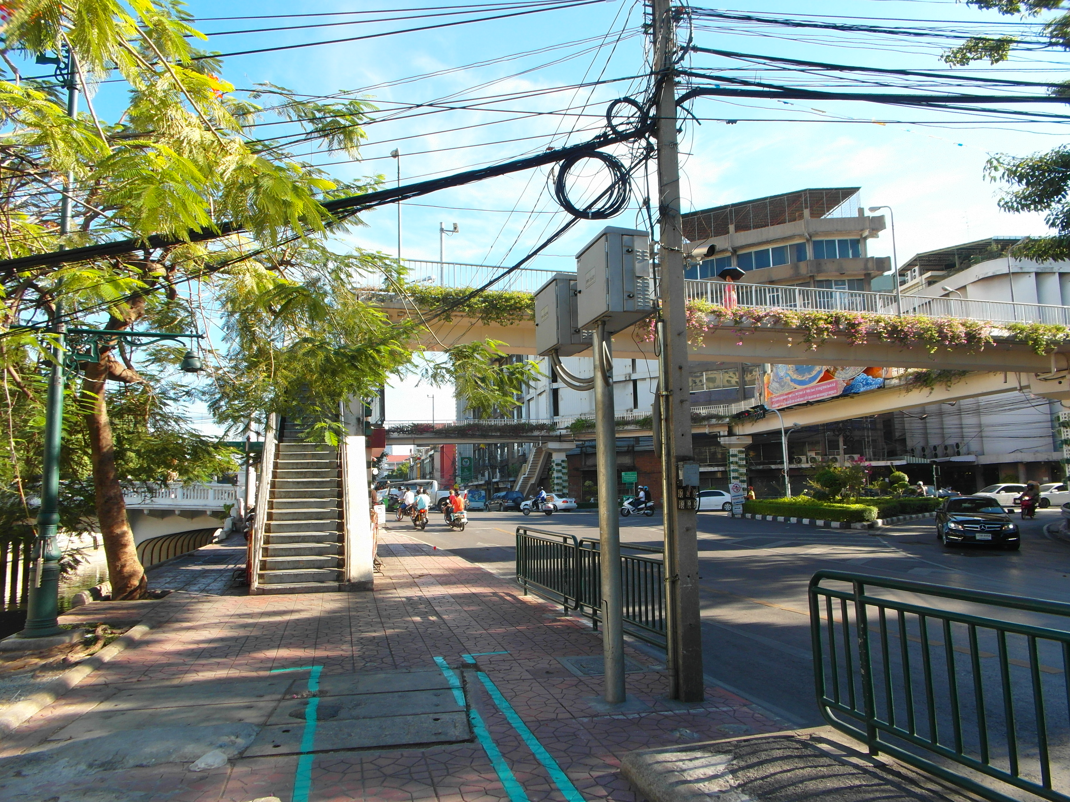 Bangkok 2013 april